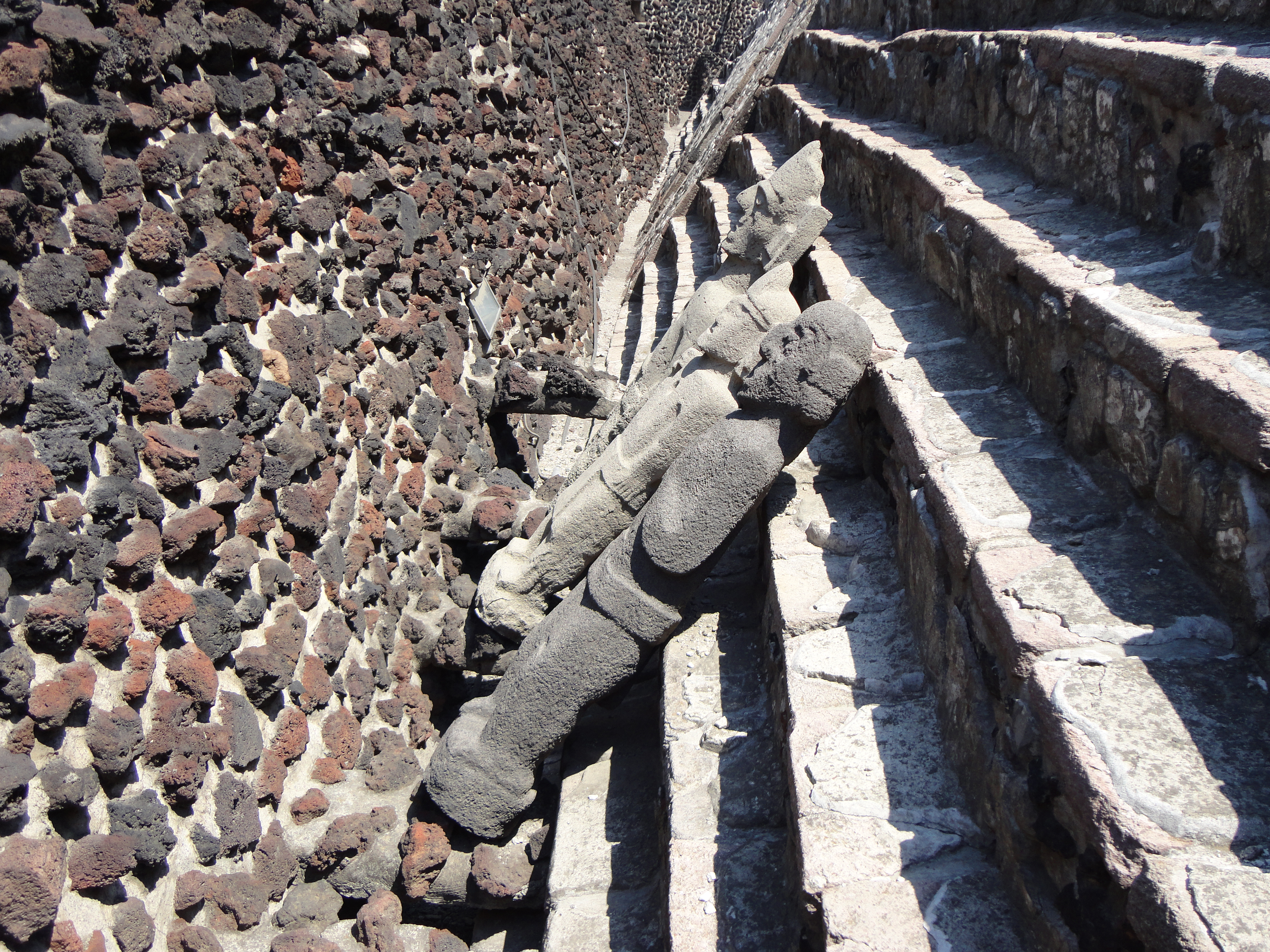 Esculturas en el Templo Mayor, Centro Histórico de la Ciudad de México.